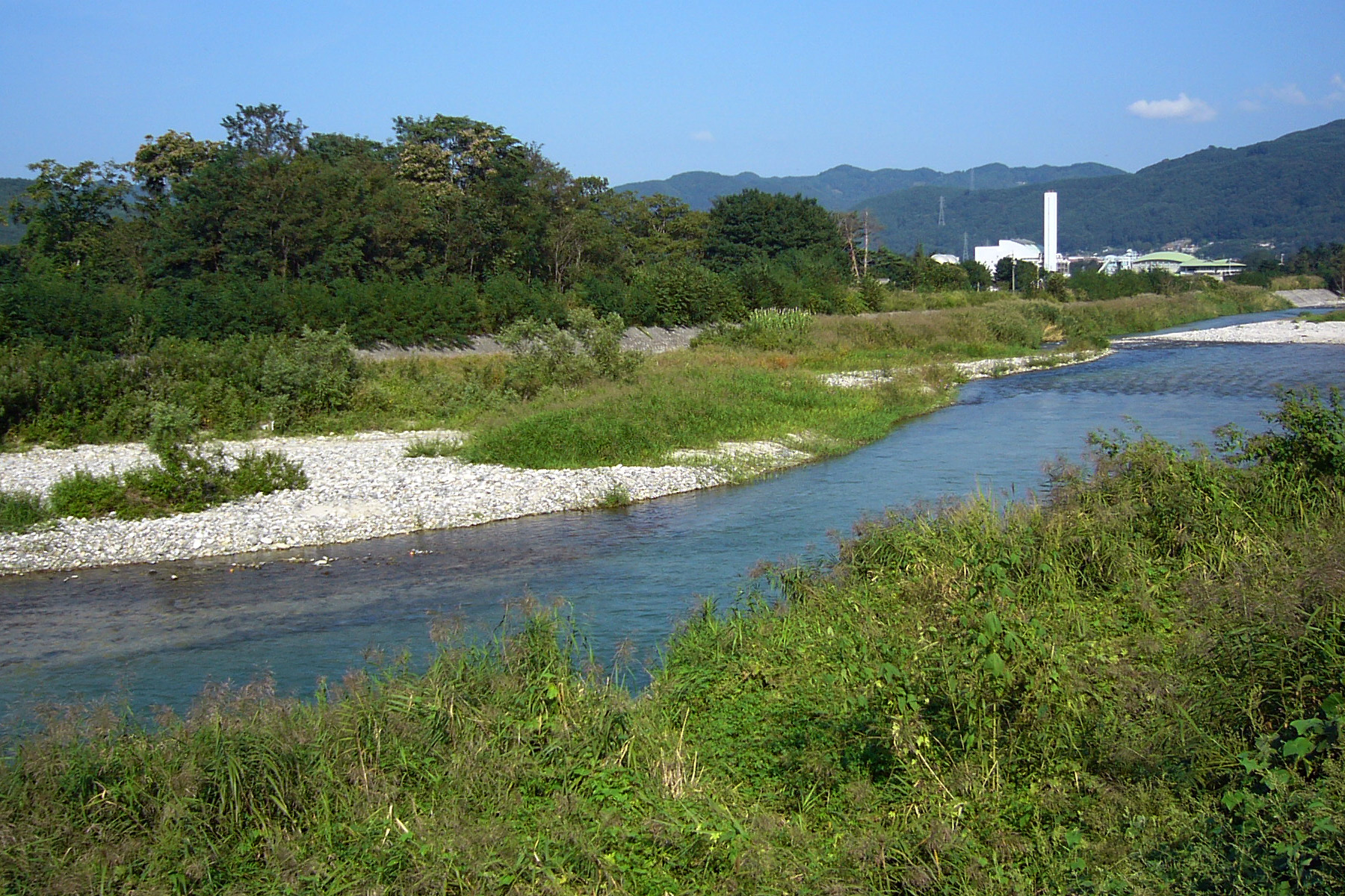 Hotaka-river in Azumino, Nagano, Japan